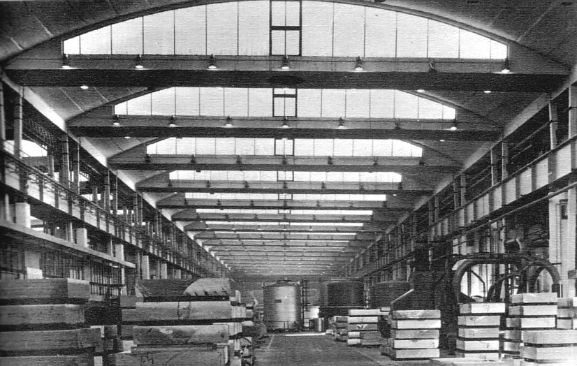 Székesfehérvári könnyűfémmű (tervezte Menyhárd István, épült 1958-59-ben)